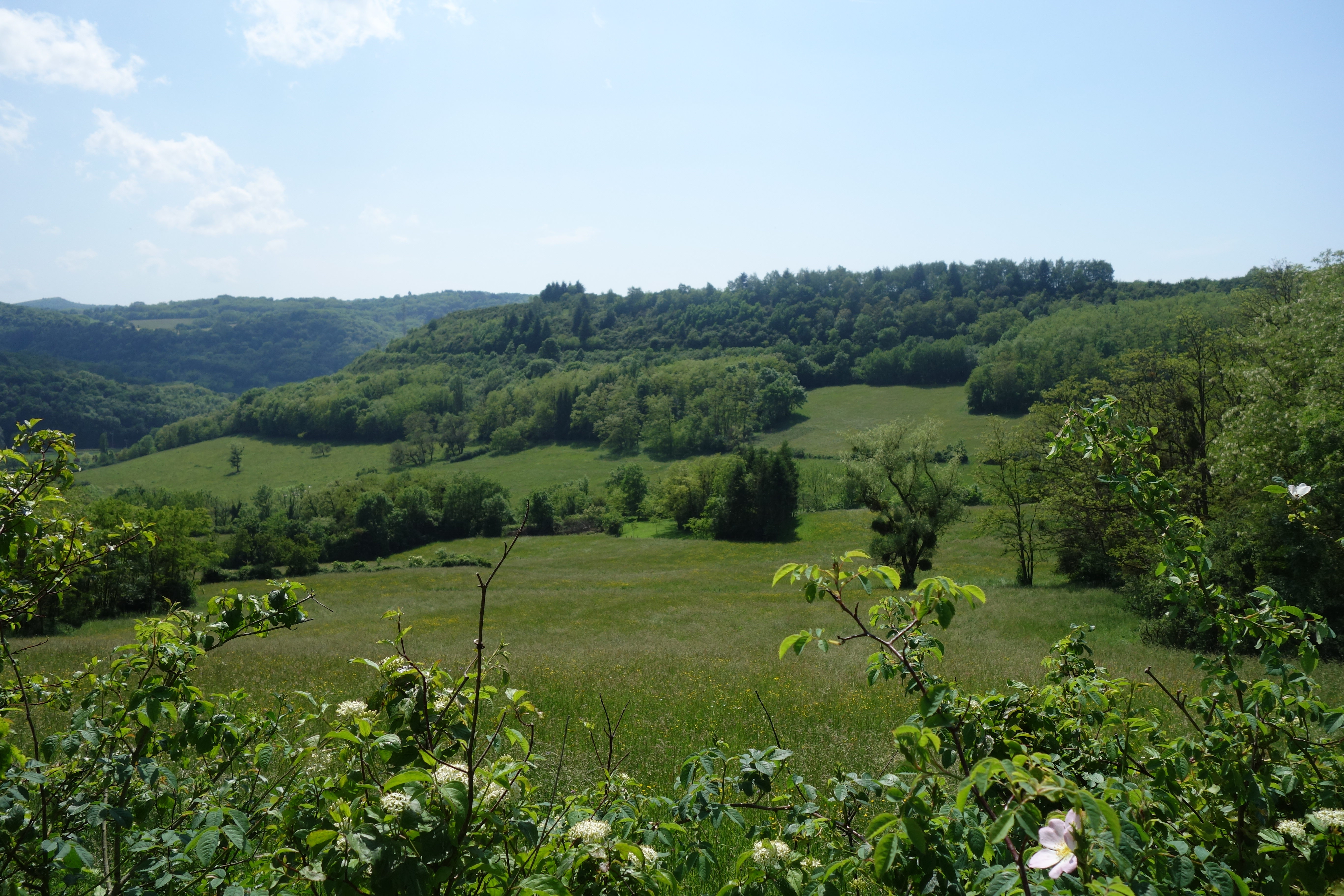 Plante de la Réserve naturelle régionale de la côte de Mancy